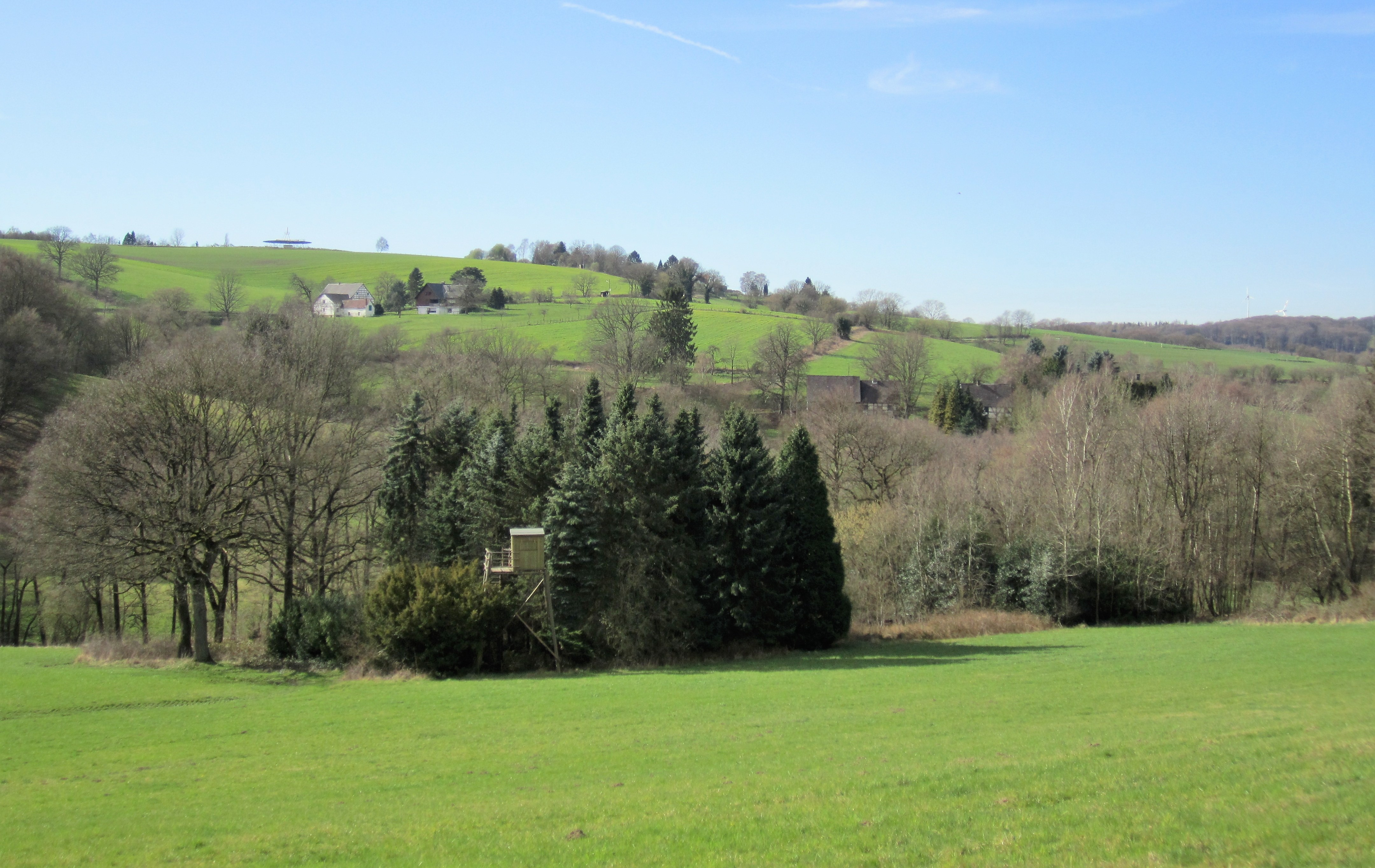 Frühjahr im Hattinger Ortsteil Oberelfringhausen. Blick über das Felderbachtal (Vordergrund) auf den Hof Bärwinkel (rechts; erstmals 1220 erwähnt) und den Lindenhof (links; erstmals 1005 erwähnt) über die Felderbachstraße zum Drehfunkfeuer BAM „Barmen“ am Höhbusch. Der abgebildete Bereich liegt überwiegend im Landschaftsschutzgebiet Niederbredenscheid/Elfringhausen, ein kleinerer Bereich (hinter den Fichten) um den Felderbach gehört zum Landschaftsschutzgebiet Felderbachtal/Paasbachtal/Deilbachtal.